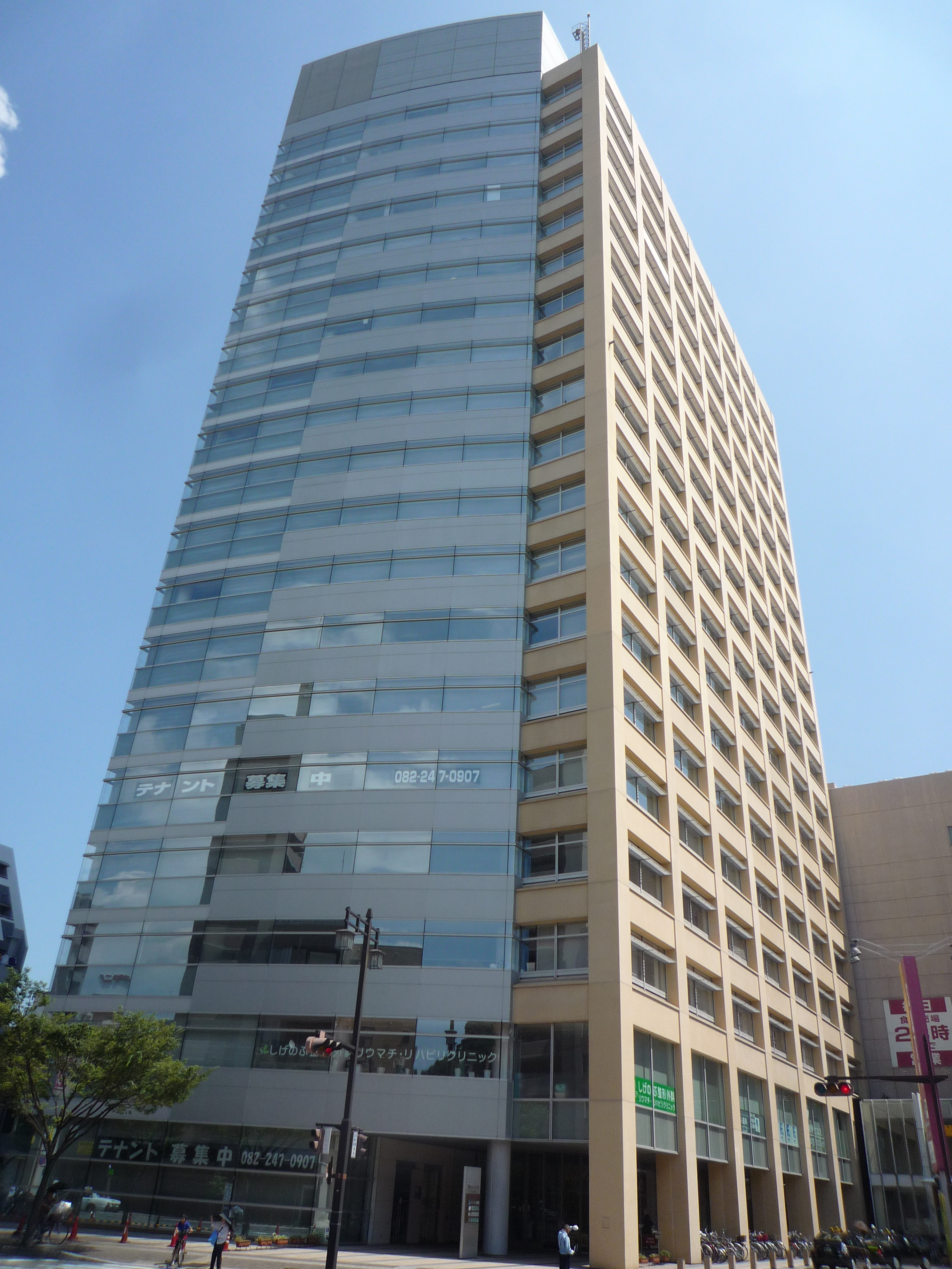 広島イーストビル